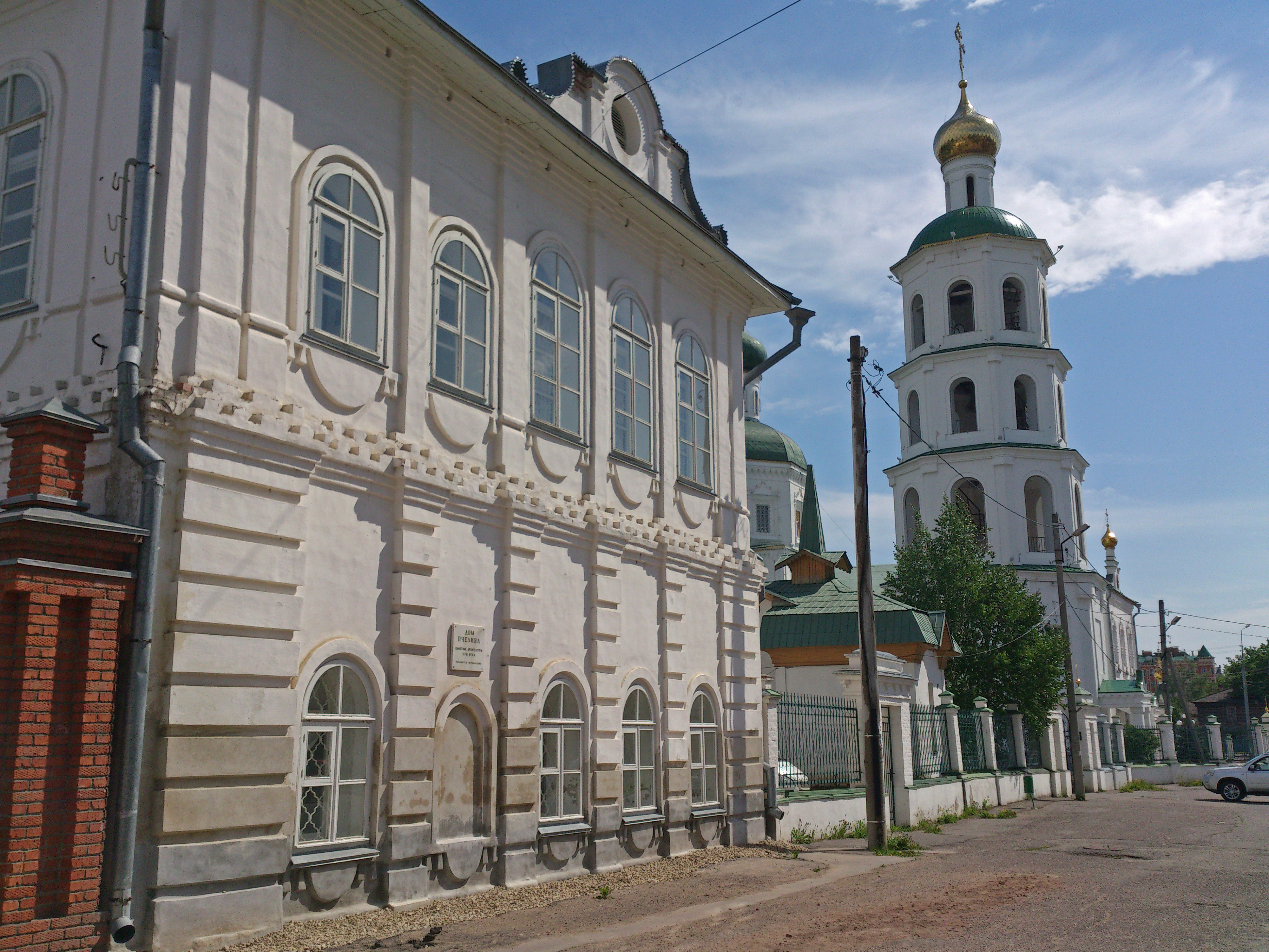 Дом Пчелиных: улица Вознесенская, 27 (29), Йошкар-Ола, Марий Эл